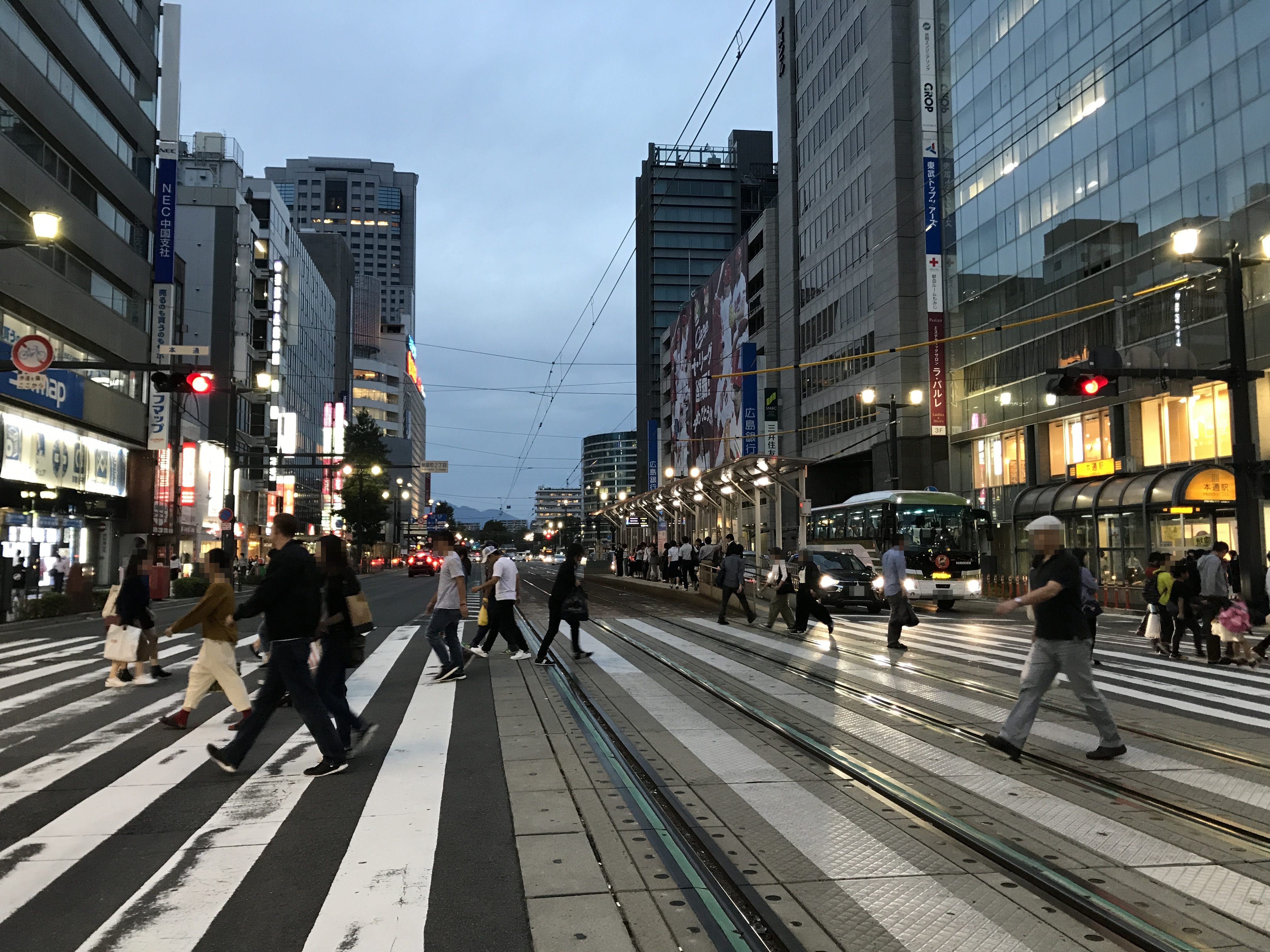 本通停留場のホームより望む鯉城通り